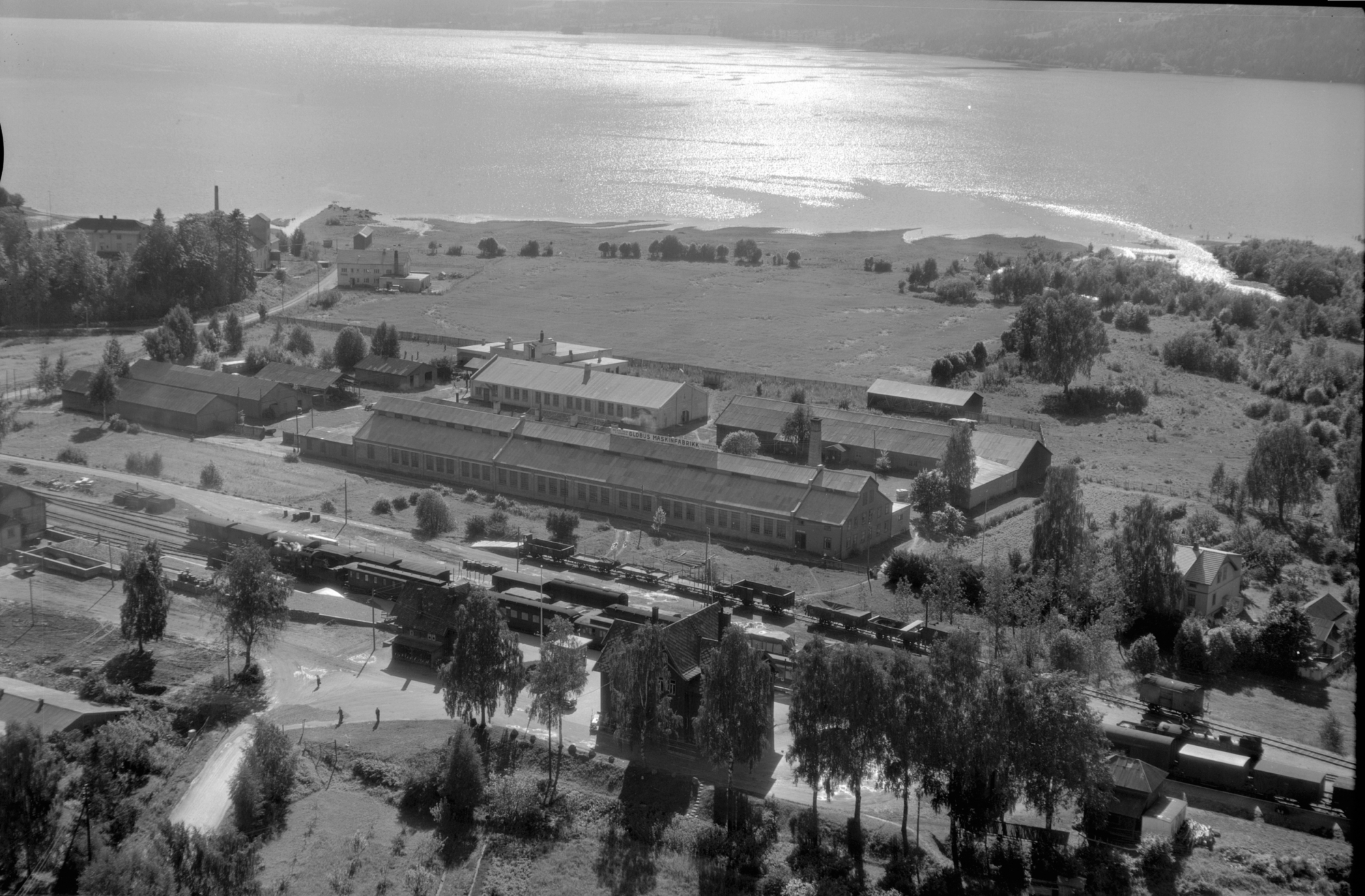 Globus maskinfabrikk ved Brumunddal stasjon, før 1970